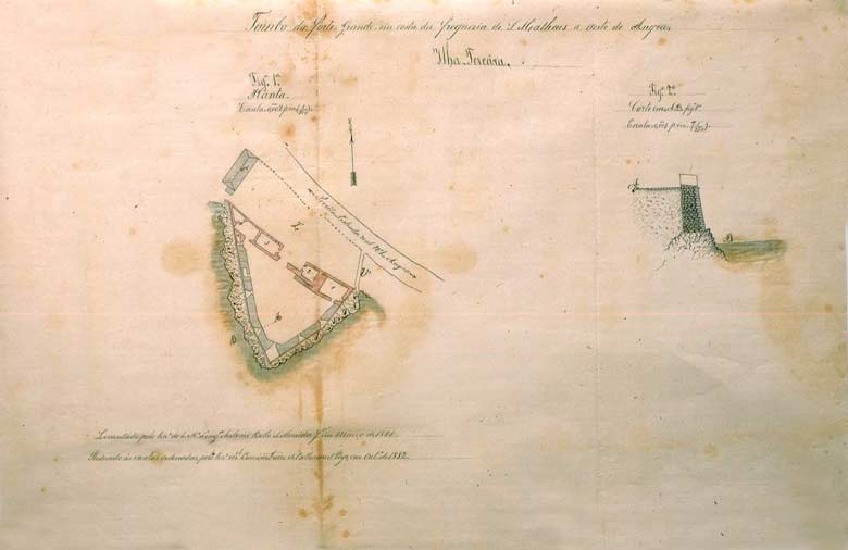 "Tombo do Forte Grande na costa da freguesia de São Matheus a oeste de Angra, Ilha Terceira"